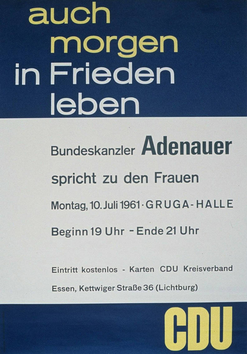 auch morgen in Frieden leben Bundeskanzler Adenauer spricht zu den Frauen ... Plakatart: Ankündigungsplakat Auftraggeber: Verantw.: CDU-Bundesgeschäftsstelle Bonn Objekt-Signatur: 10-001: 951 Bestand: Plakate zu Bundestagswahlen (10-001) GliederungBestand10-18: Plakate zu Bundestagswahlen (10-001) » Die 4. Bundestagswahl am 17. September 1961 » CDU » Ankündigungsplakate Lizenz: KAS/ACDP 10-001: 951 CC-BY-SA 3.0 DE